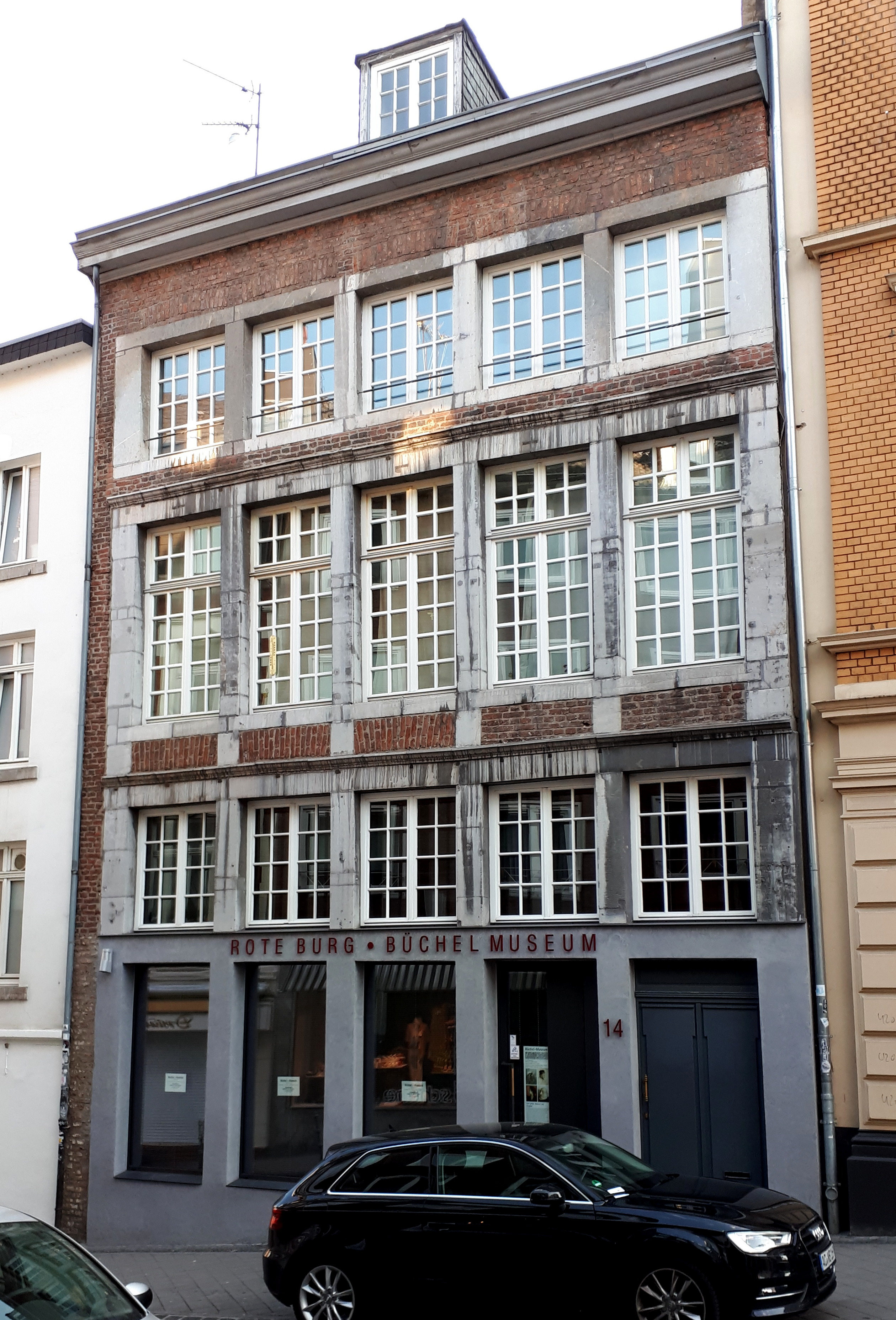 Büchel 14, Rote Burg, Kunstmuseum, Baudenkmal in Aachen